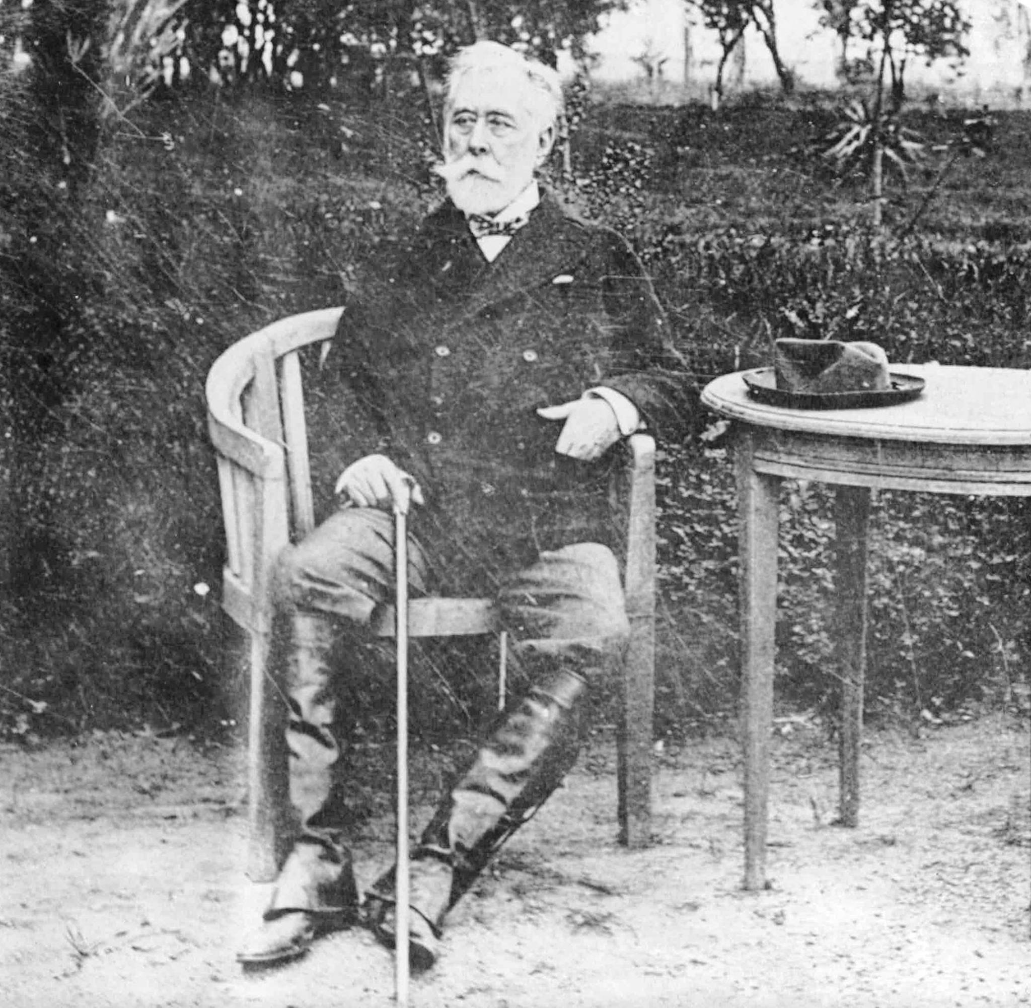 El Presidente Dr. Manuel Quintana en el campo, después de ponerse las botas, 1905. Documento fotográfico. Inventario 28479. Archivo General de la Nación Argentina